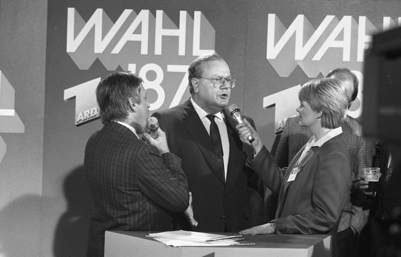 25.1.1987 Bundestagswahl Wahlparty der FDP im Festzelt vor dem Thomas-Dehler-Haus Fernseh-Interviews mit Bundesminister für Wirtschaft, Dr. Martin Bangemann und Bundesminister für Auswärtige Amt, Hans-Dietrich Genscher